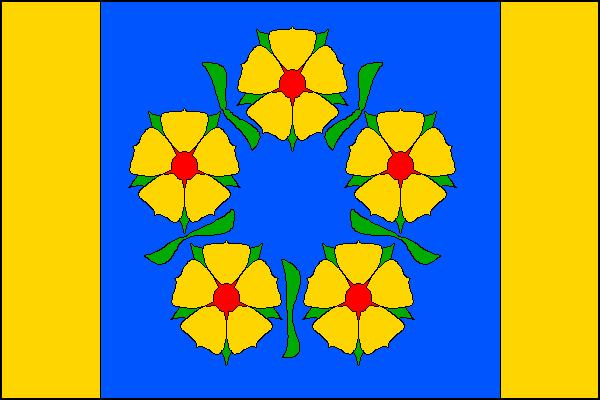 Vlajka obce Růžená